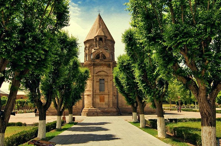 Эчмиадзинский Кафедральный Собор, Армения